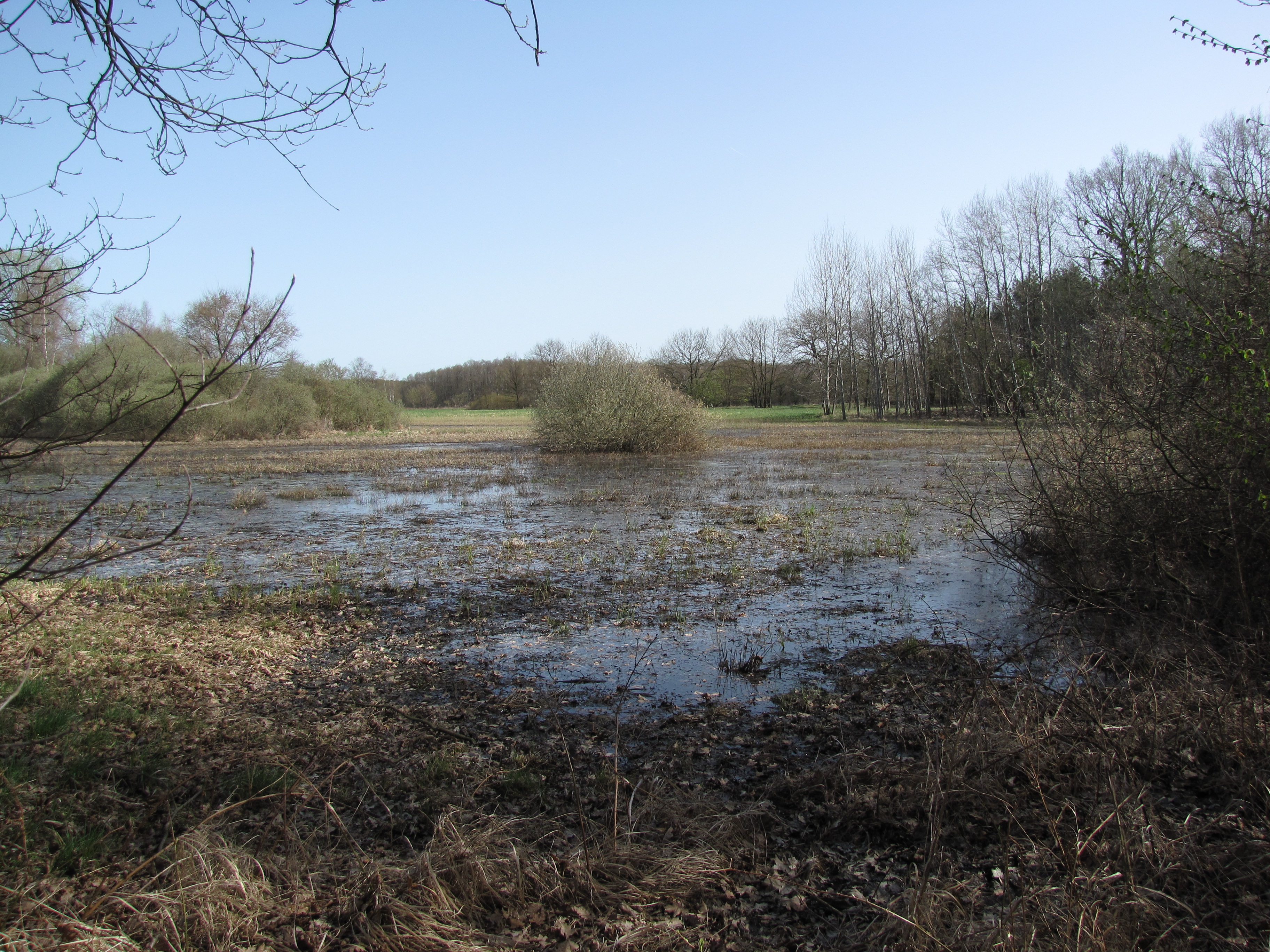 Morastige Wiese im Naturschutzgebiet Gadsdorfer Torfstiche und Luderbusch, nördlich von Gadsdorf, Gem. Am Mellensee, Brandenburg, Deutschland